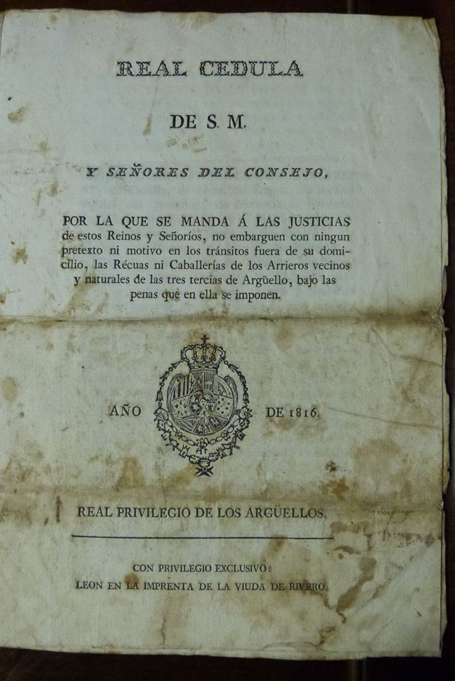 Real Privilegio concedido a los habitantes de la comarca e los Argüellos que reafirma su estatus de hidalgía por las contribuciones equinas realizadas durante la guerra de independencia